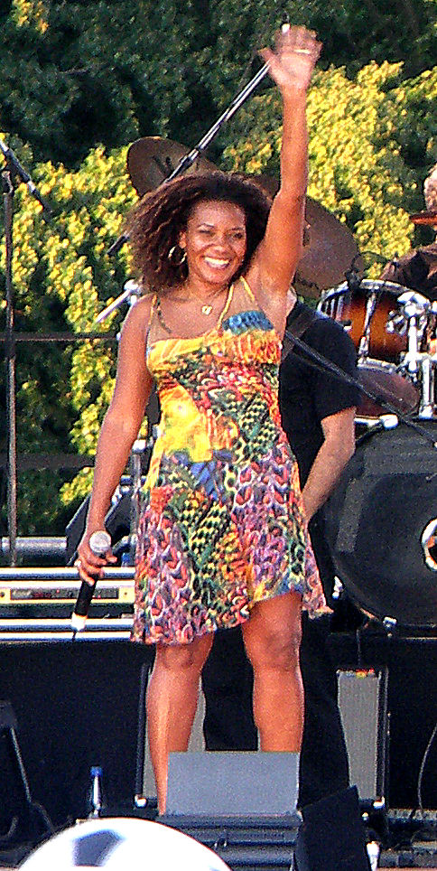 Margareth Menezes in June 2006 in Berlin/Germany